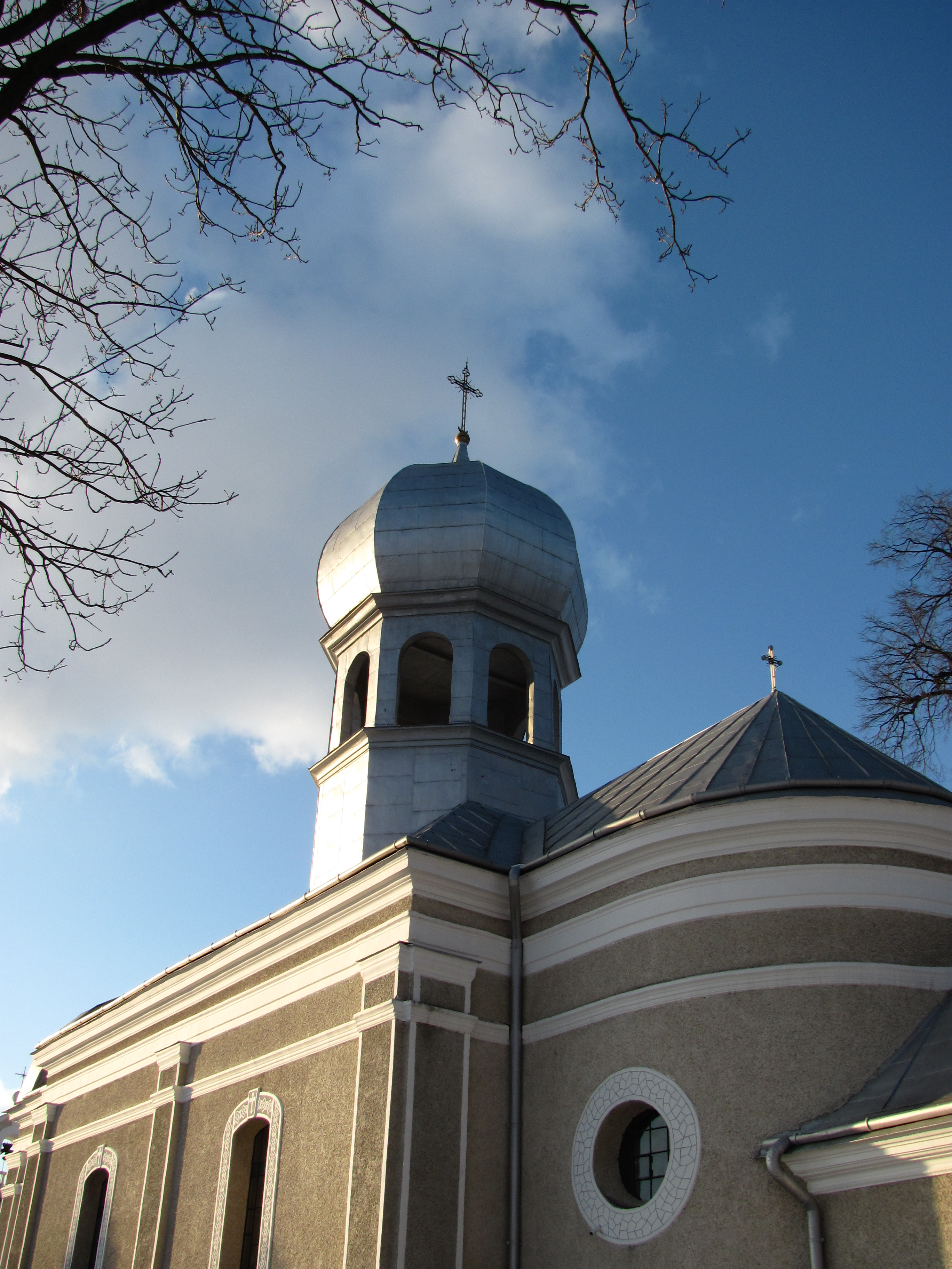 Греко-католицька церква "Введення в Храм Пресвятої Богородиці". Церква в Мшані побудована 1799 року